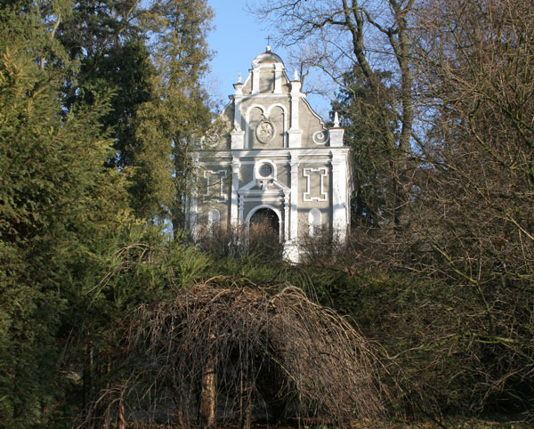 Mauzoleum Elżbiety Izabelli Czartoryskiej. Gołuchów.